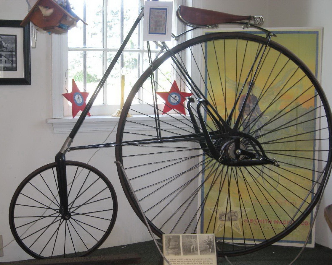 Star Bicycle - Hochrad im Museum Smithville Mansion, Eastampton, New Jersey